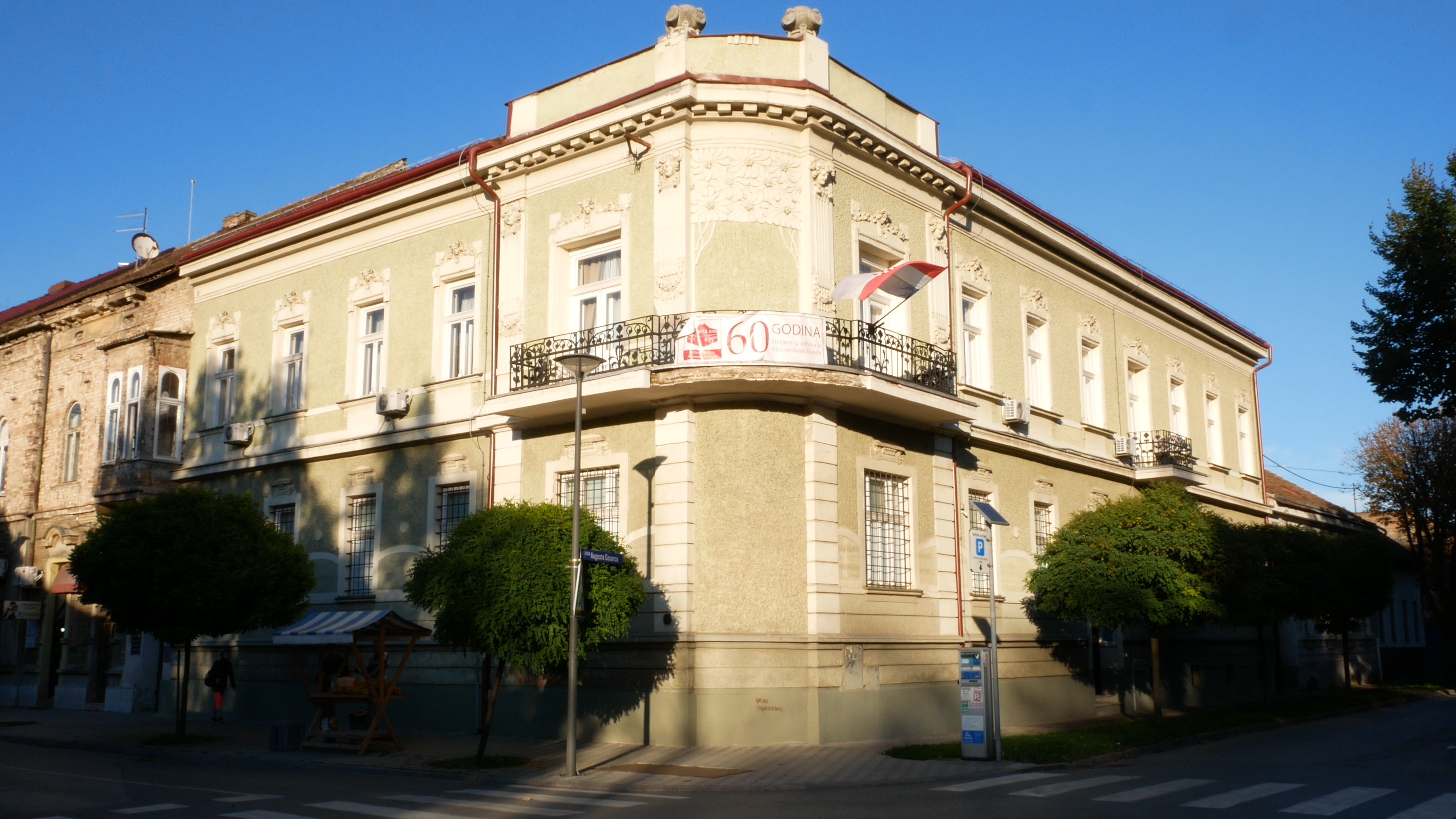 Zgrada Državnog arhiva u Slavonskom Brodu